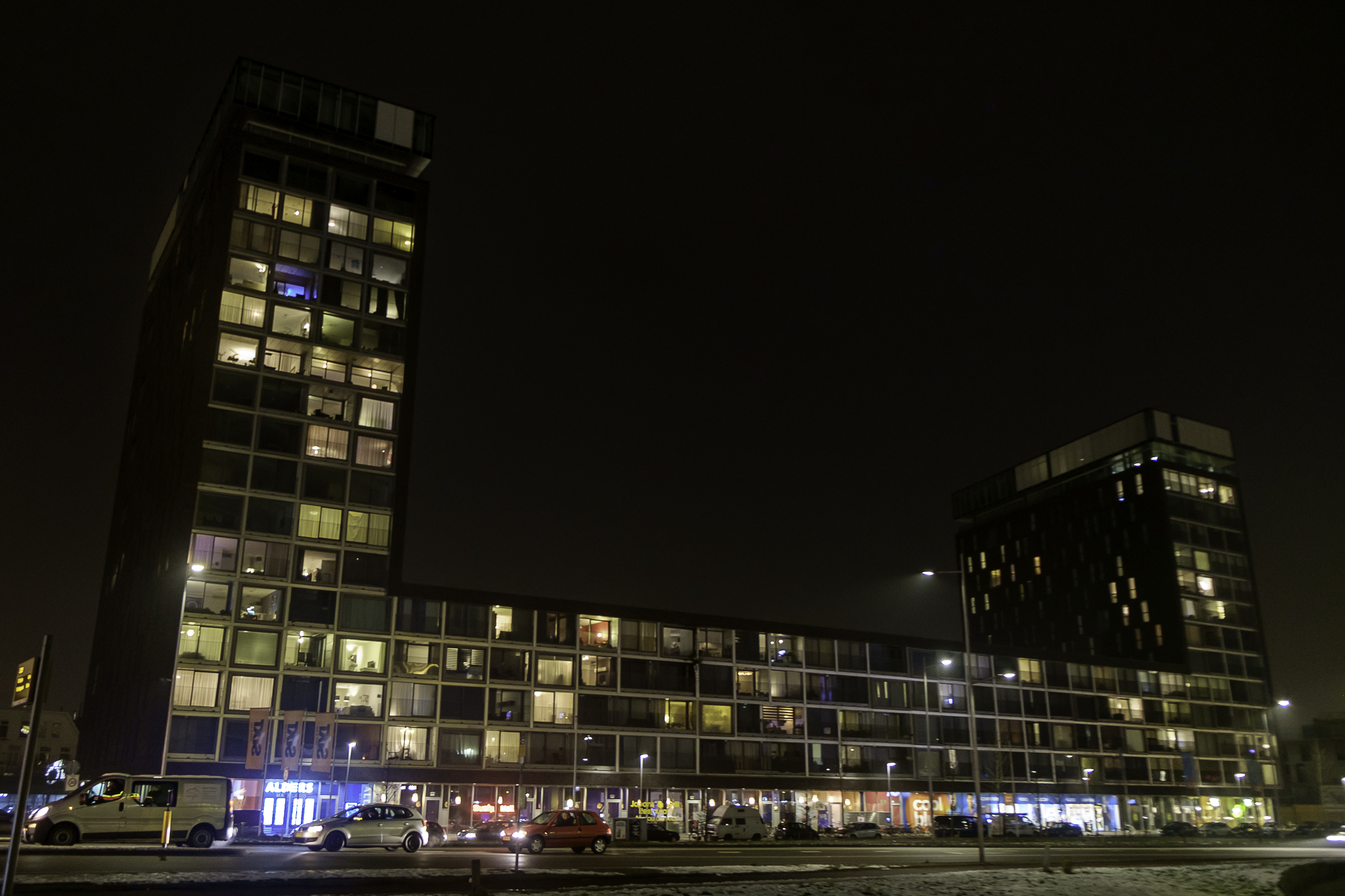 Kop van Oost bij avond